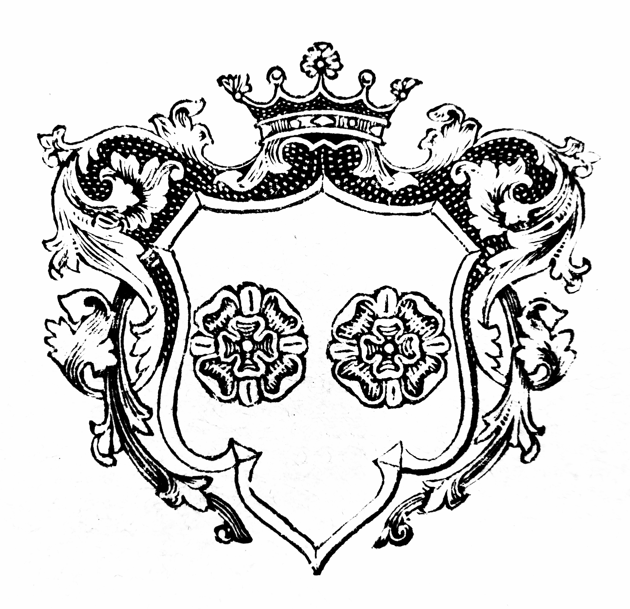 Herb Białej na dokumencie Heimatschein 1914